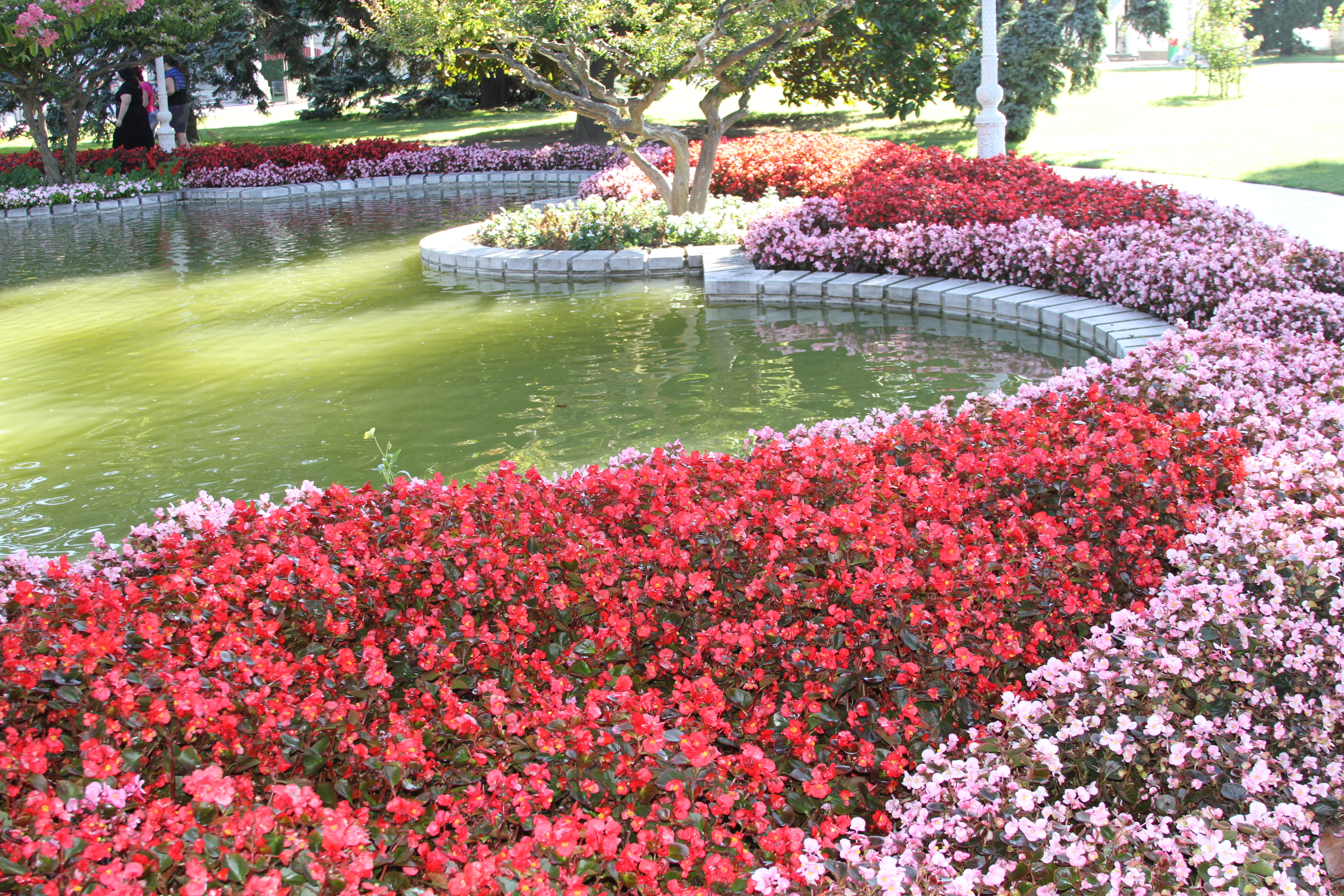 Flores no jardim do Palácio de Dolmabahçe